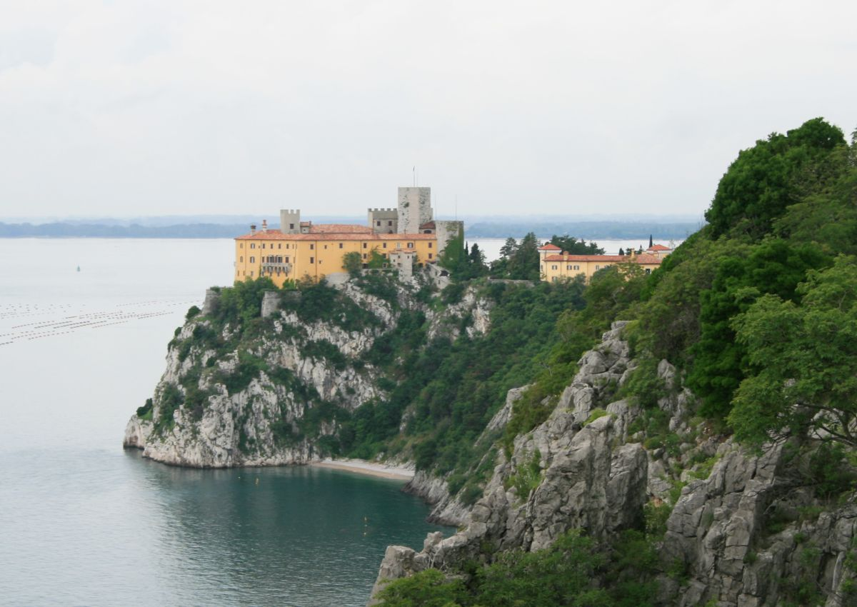 Italien/Italia/Italy: Friuli-Venezia Giulia, Prov. Trieste, Castello di Duino